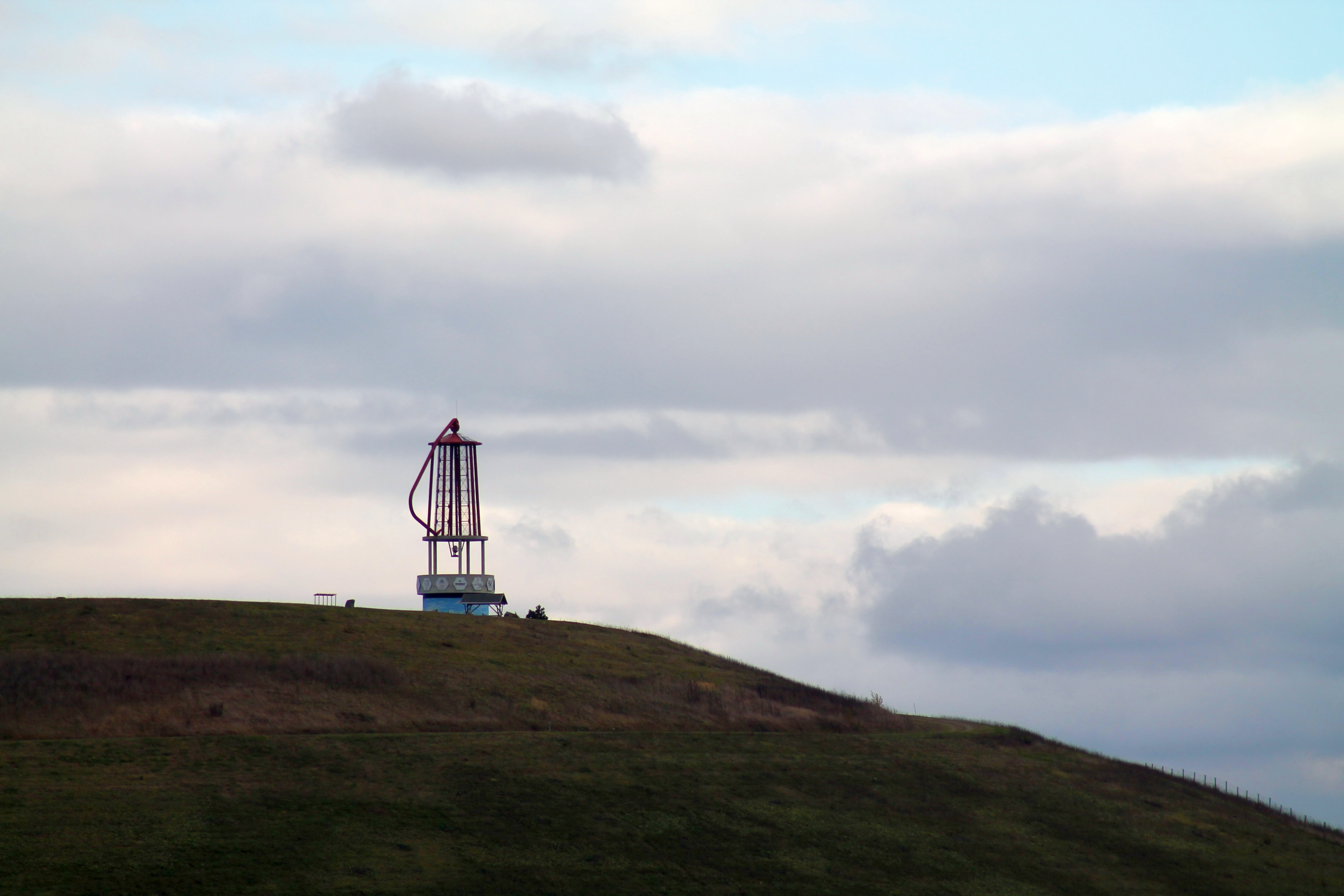 Skulptur Grubengeleucht auf der "Schmirchauer Höhe". Ronneburg, Thüringen, Deutschland.